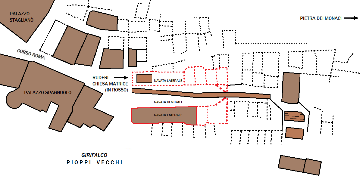 Cartina descrittiva dell'antico borgo/rione Pioppi Vecchi, il nucleo più antico (IX secolo D.C.) di Girifalco. I tratti in rosso sottolineano le mura perimetrali dell'antica Chiesa Madre di Santa Maria delle Nevi distrutta dal terremoto del 1783.